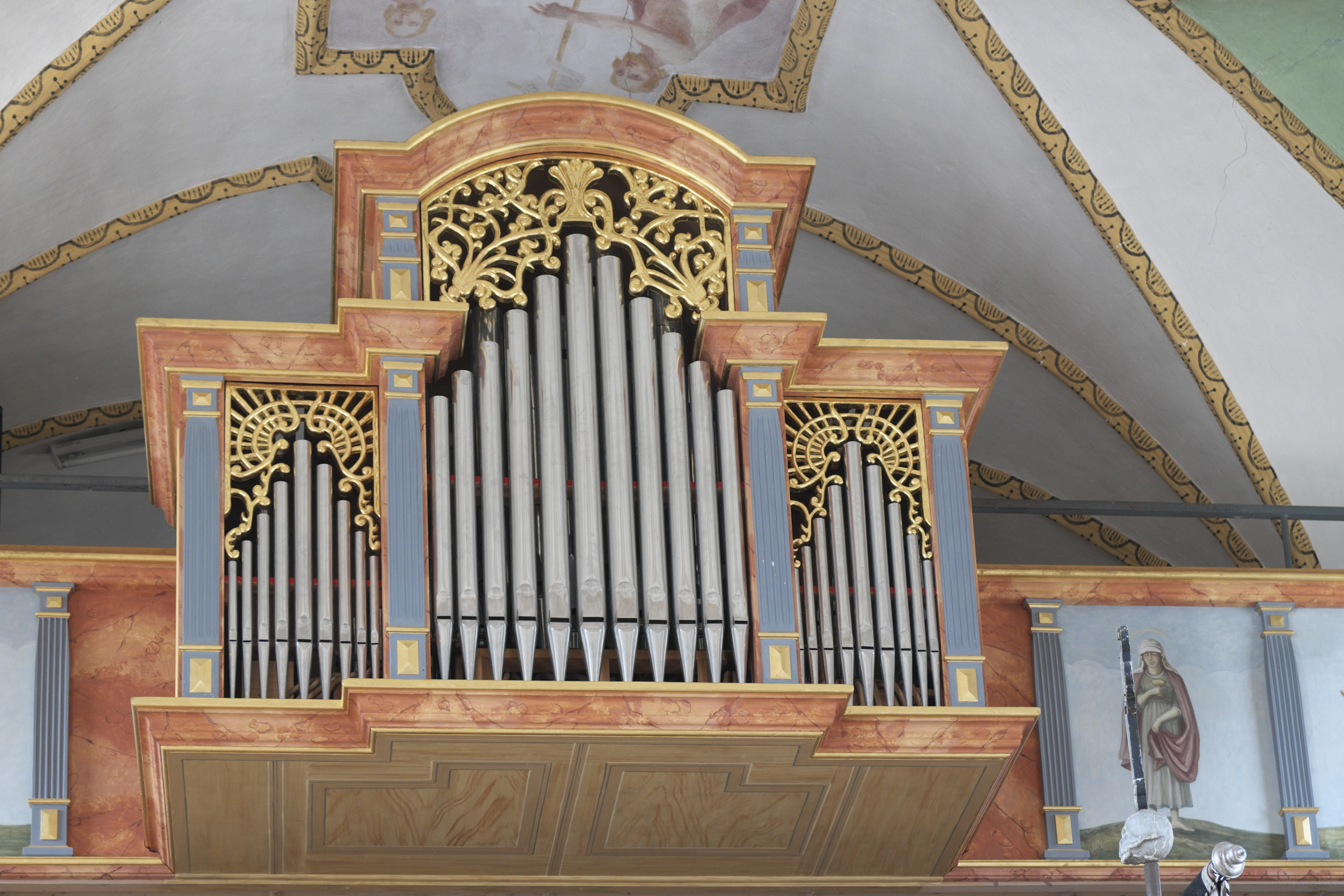 Katholische Pfarrkirche St. Andreas in Aying im Landkreis München (Bayern/Deutschland), Orgel